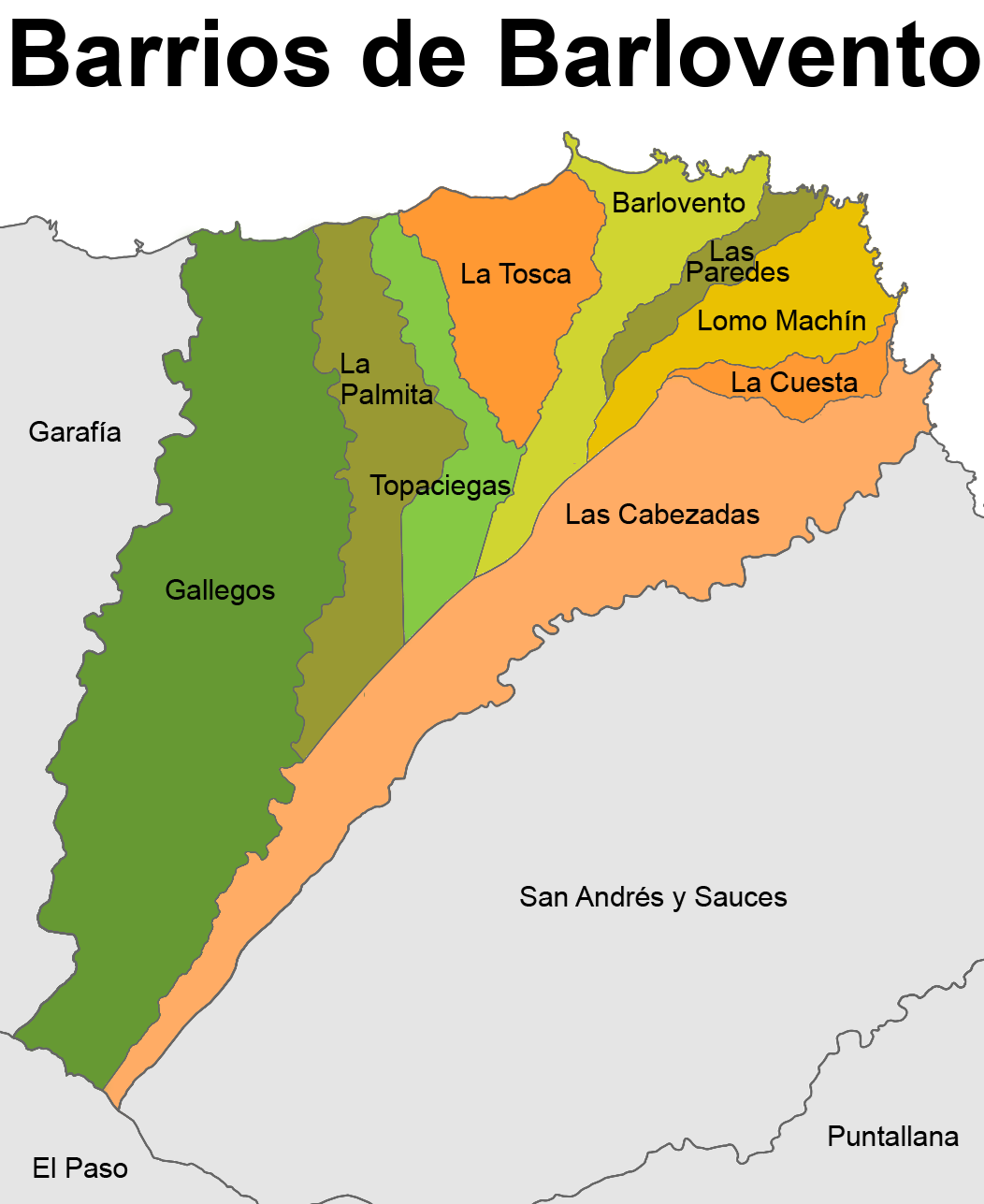 Mapa Barrios de Barlovento